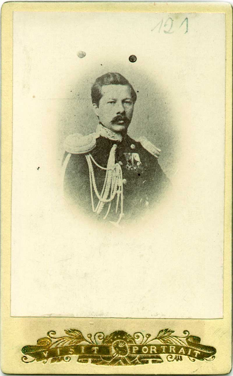 Беларуская (тарашкевіца): Партрэт Людвіка Зьвяждоўскага (Ludvik Źviaždoŭski)